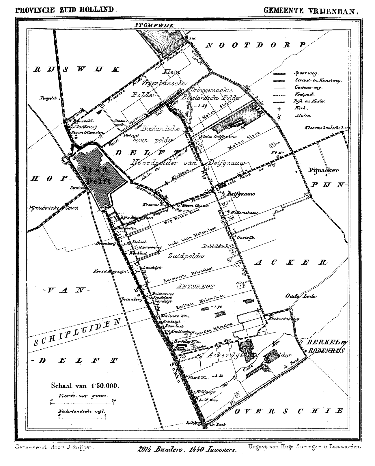 bron